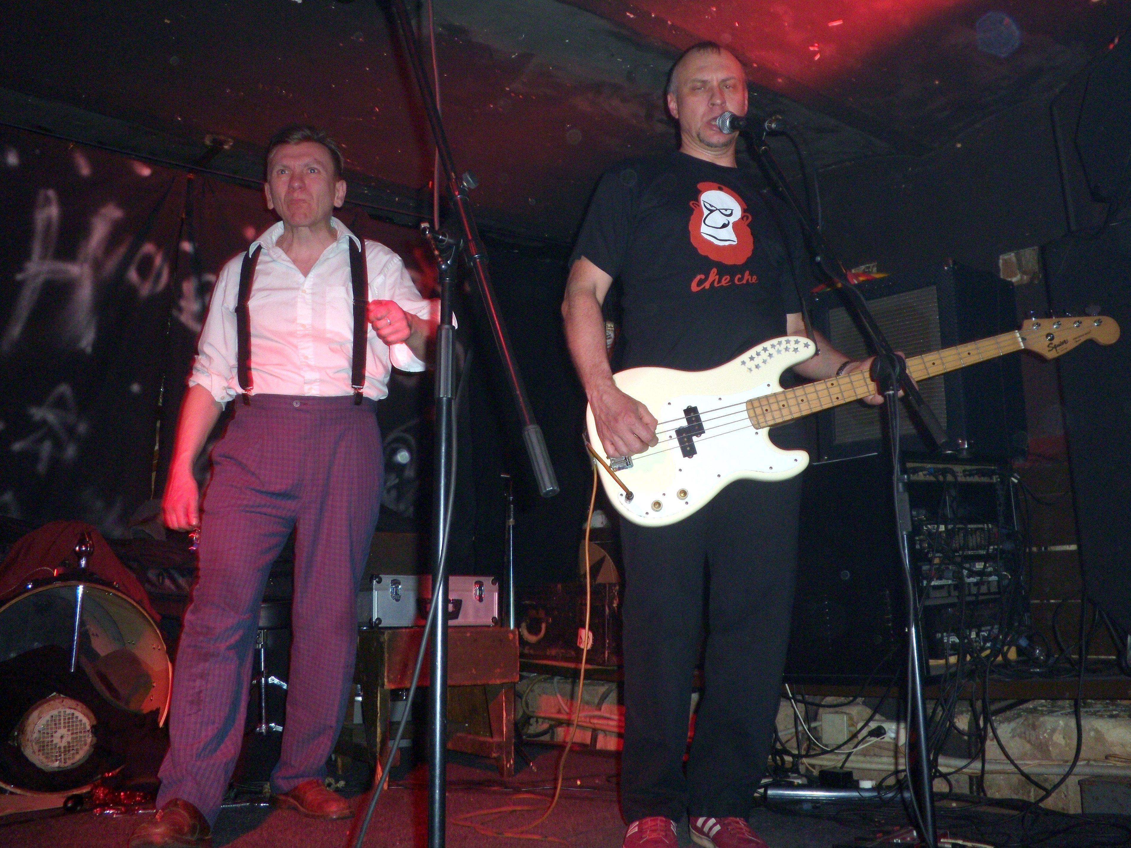 Выступление группы НОМ в клубе ОГИ. На фотографии А.Кагадеев и Юрий Салтыков (И.Н.Турист).